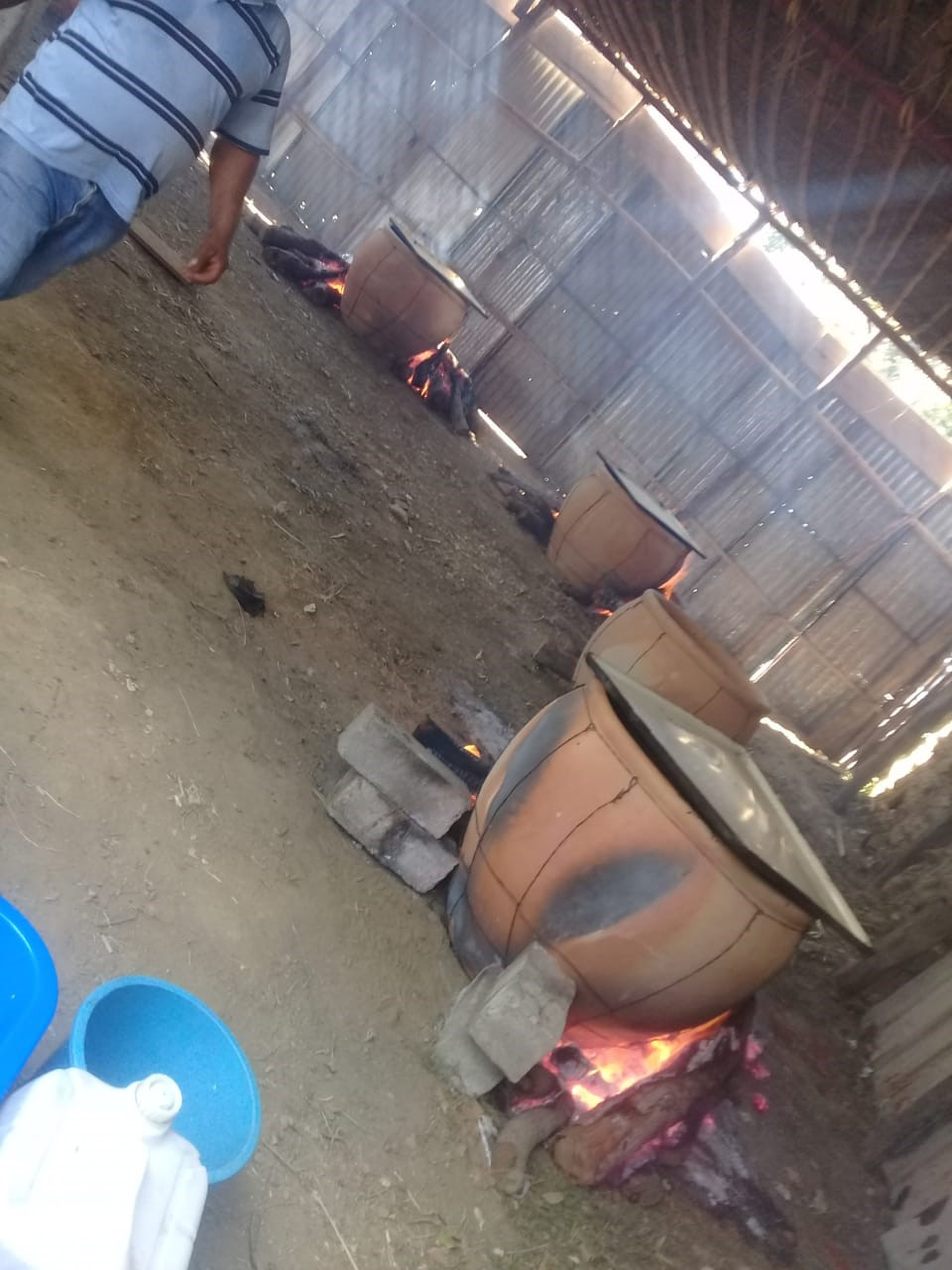 la venta